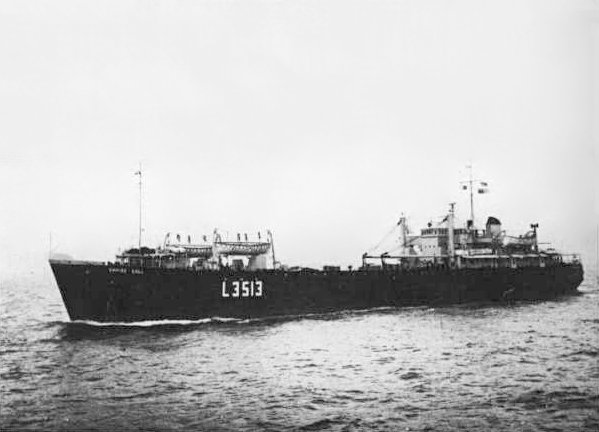 RFA Empire Gull (L3513)